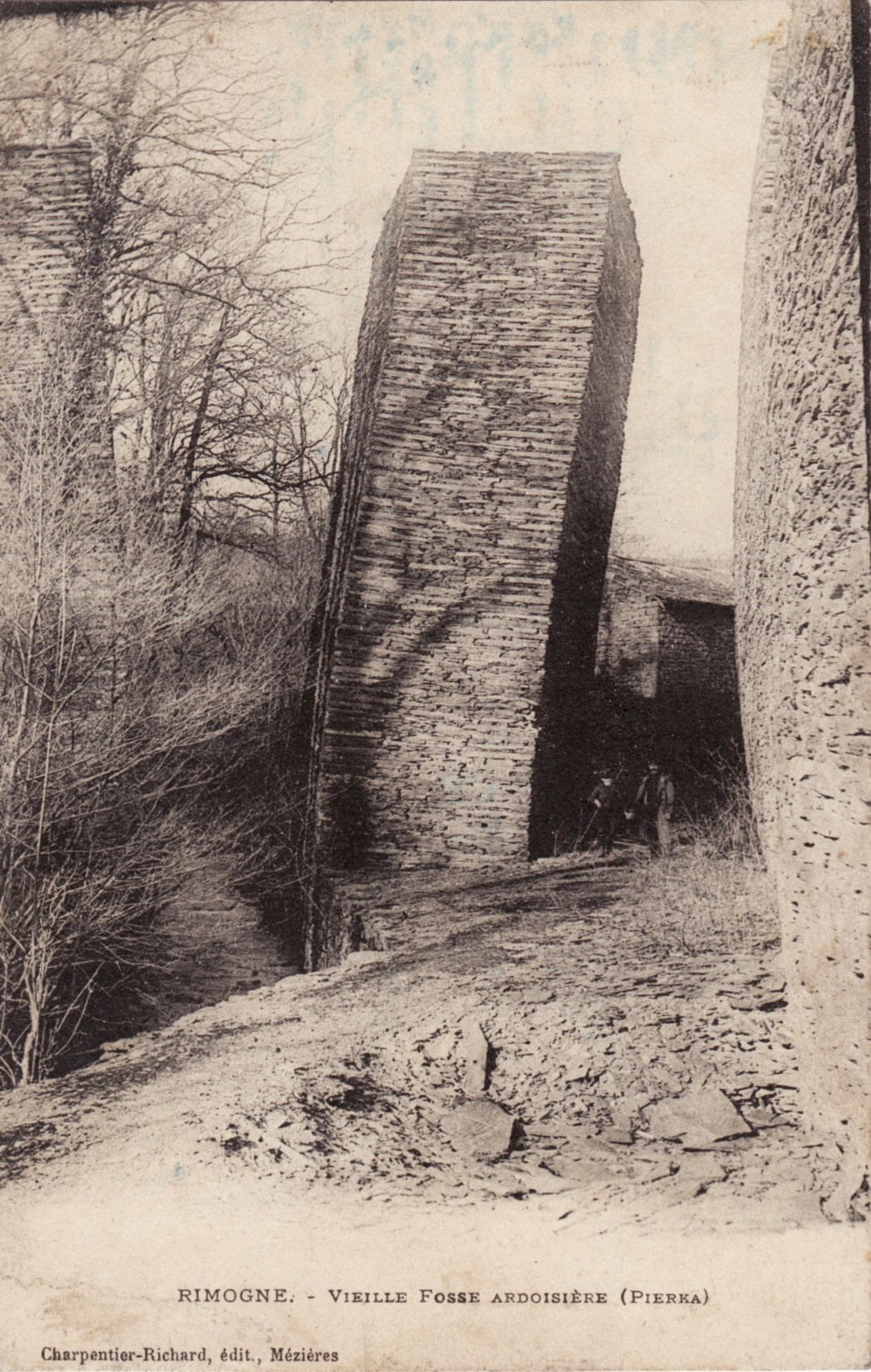 Carte postale Pierka